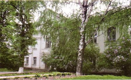 Лікарня: Петрівсько-Роменська Дільнича Лікарня 2012